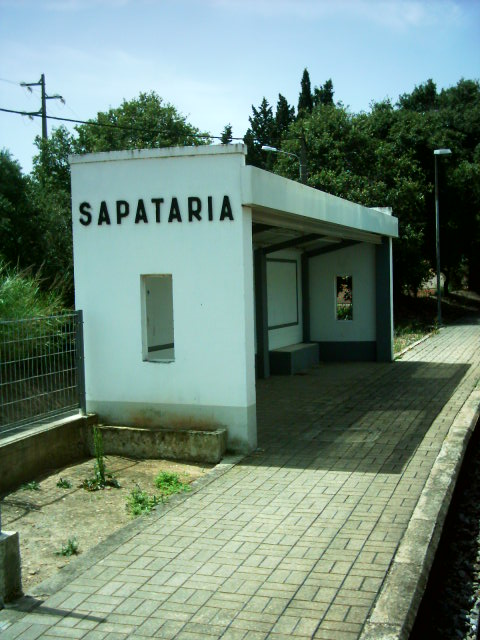 Apeadeiro ferroviário da Sapataria